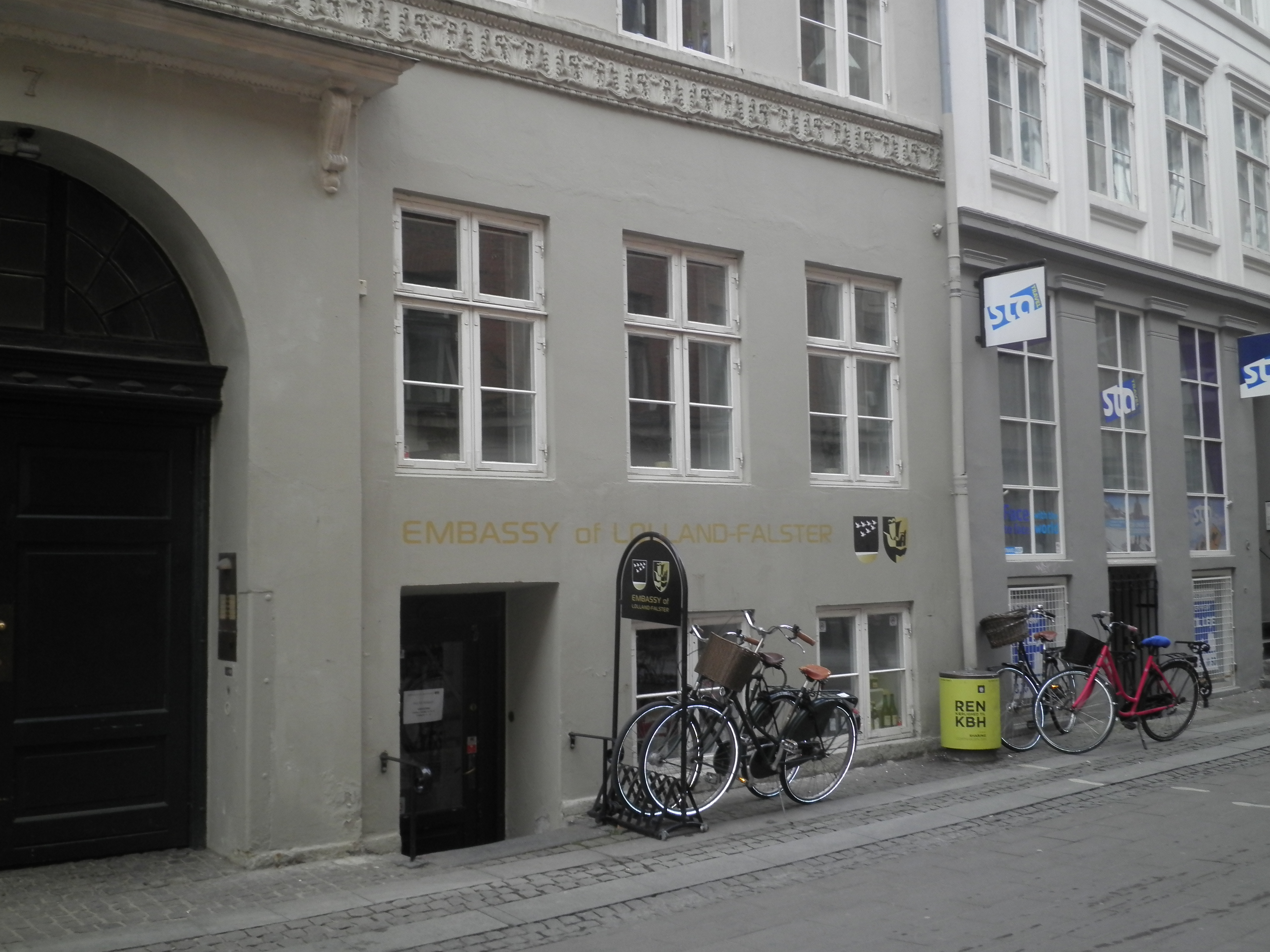 Embassy of Lolland-Falster der drives af ervervsorganisationen Business LF. Beliggende i Rosengården i København.